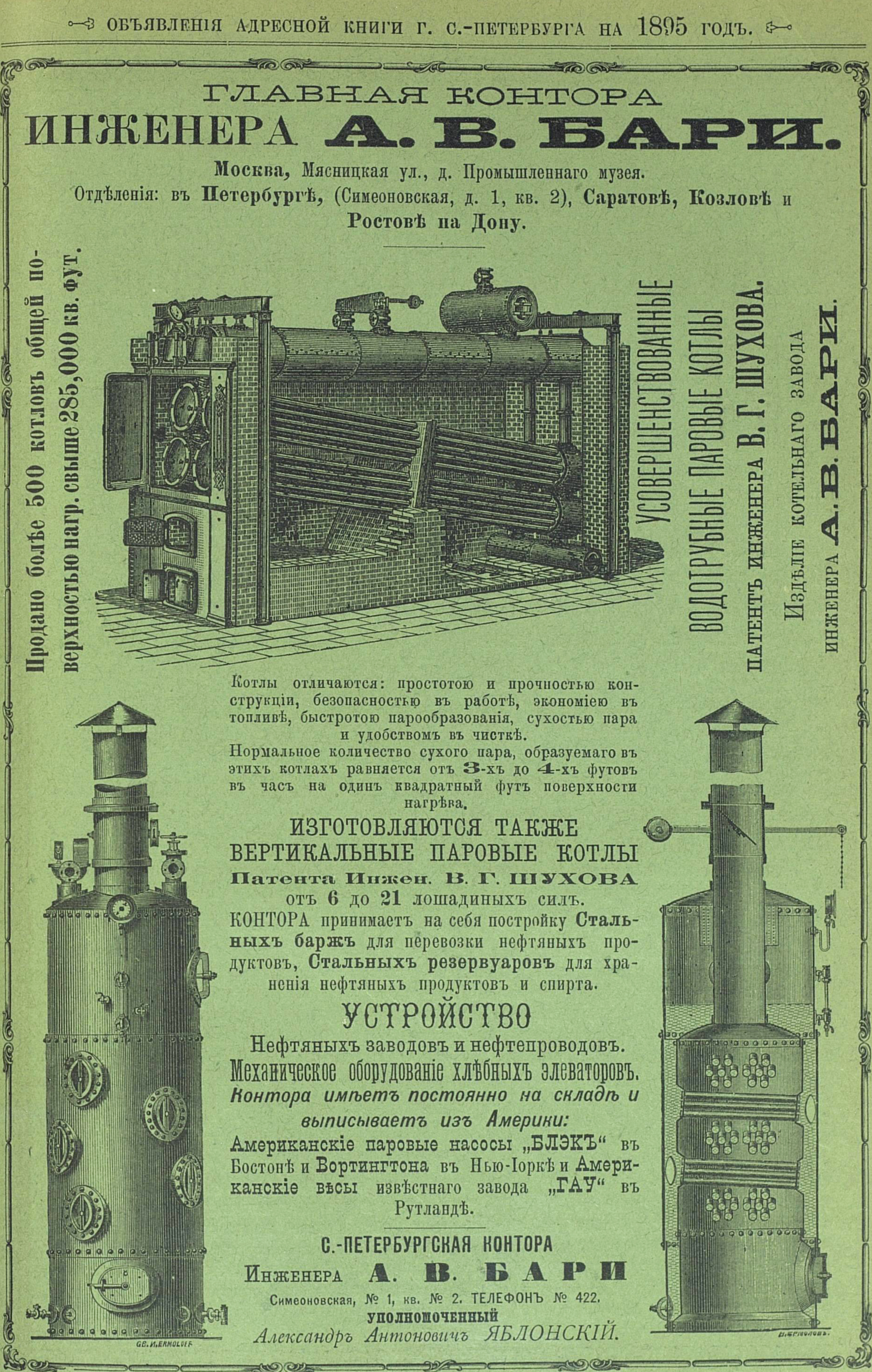 Реклама продукции завода инженера А. В. Бари, 1895 год.